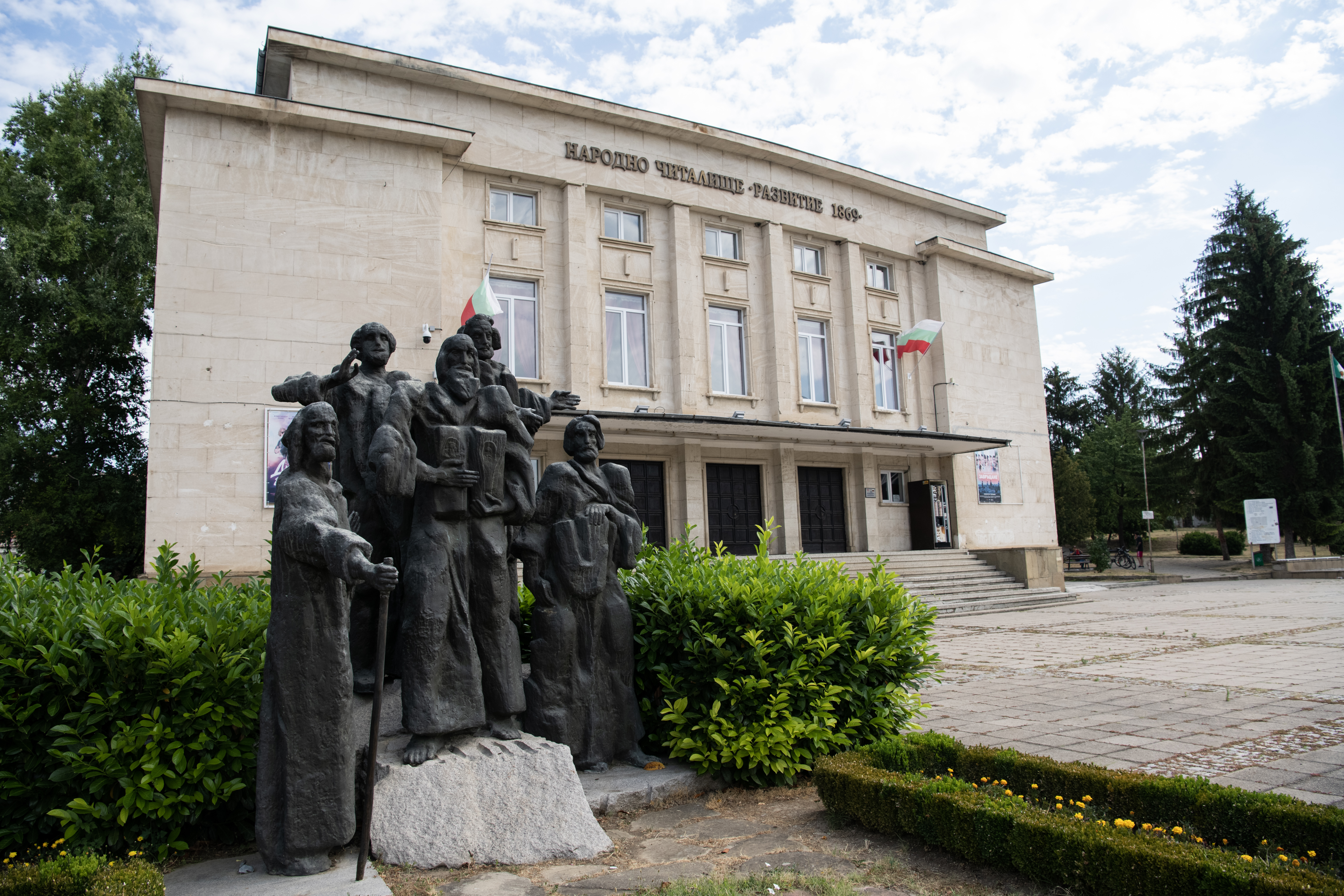 Снимката документира паметника на учениците на Кирил и Методий в град Разград.